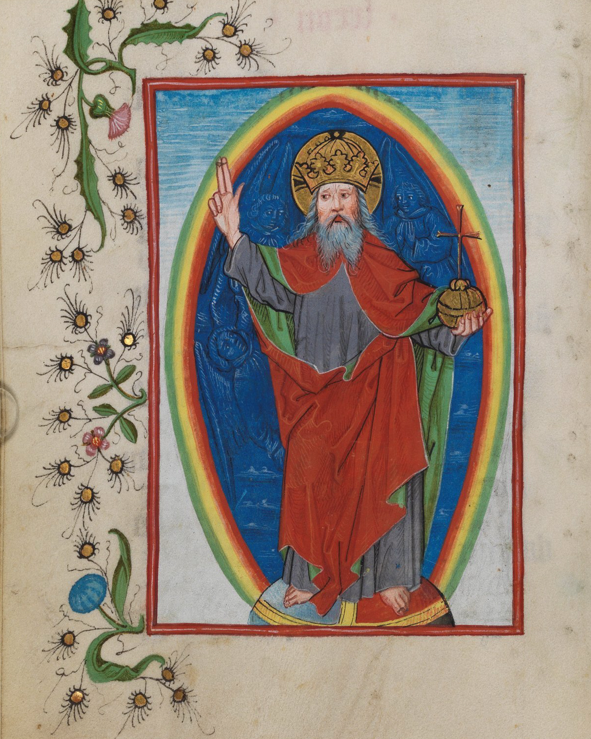 Illuminierte Seite aus dem Waldburg-Gebetbuch, WLB Stuttgart, Cod. brev. 12, fol. 78v